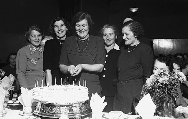 Teitl Cymraeg/Welsh title:Parti penblwydd WI Wem Ffotograffydd/Photographer: Geoff Charles (1909-2002) Dyddiad/Date: October 1, 1947. Cyfrwng/Medium: Negydd ffilm / Film negative Cyfeiriad/Reference: (gcc05064) Rhif cofnod / Record no.: 3472775 Rhagor o wybodaeth am gasgliad Geoff Charles yn Llyfrgell Genedlaethol Cymru More information about the Geoff Charles Collection at the National Library of Wales Mae ffotograffau Geoff Charles hefyd yn rhan o Broject Europeana Libraries Geoff Charles' photographs also form part of the Europeana Libraries Project